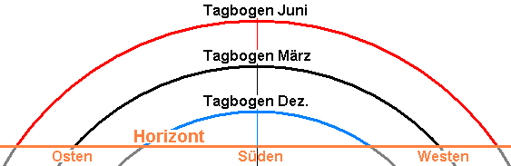 Auf/Untergänge und Tagbögen der Sonne im Winter, Frühjahr und Sommer - schematisch für Mitteleuropa, Blick von Nordost über Süd bis Nordwest